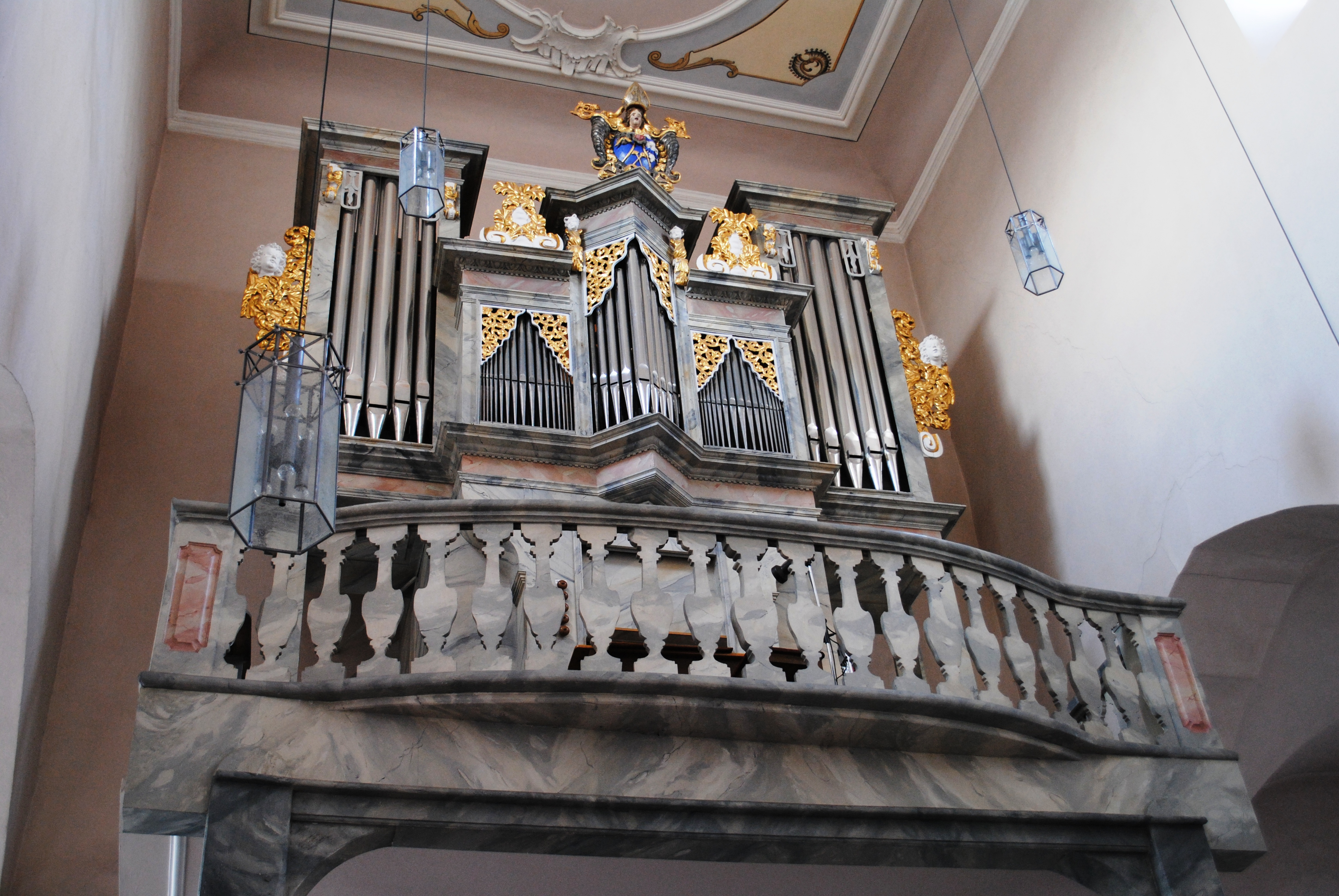 Kirche Dimbach, Volkach, Orgel